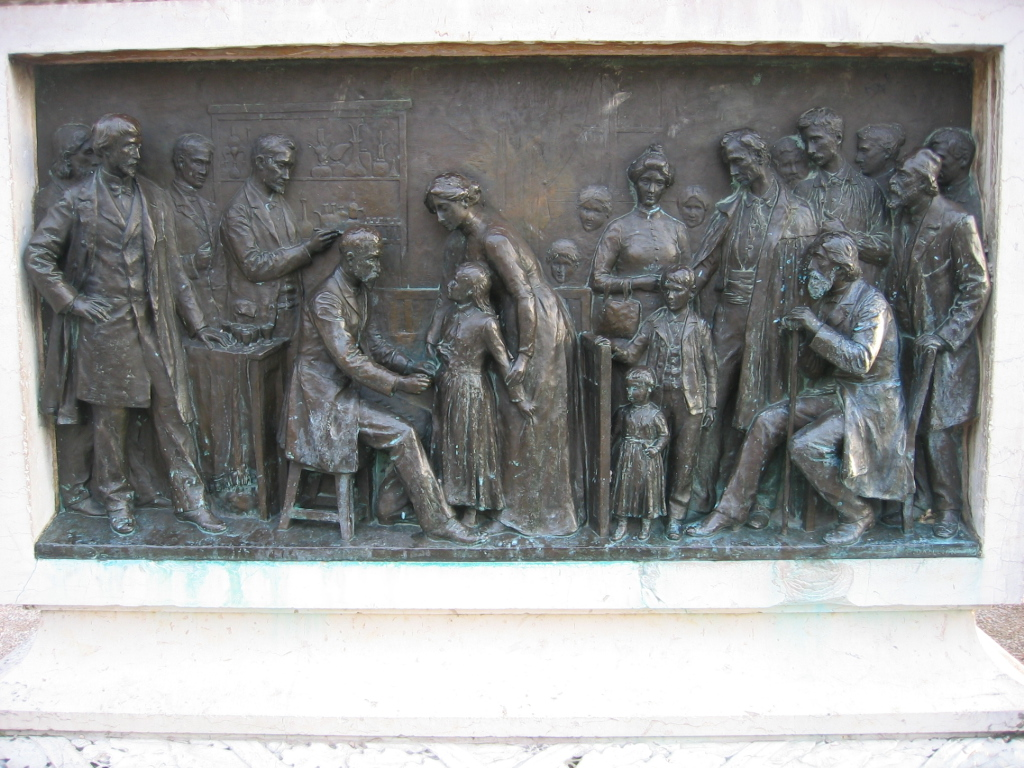 Plaque Louis Pasteur - Arbois - Jura - France